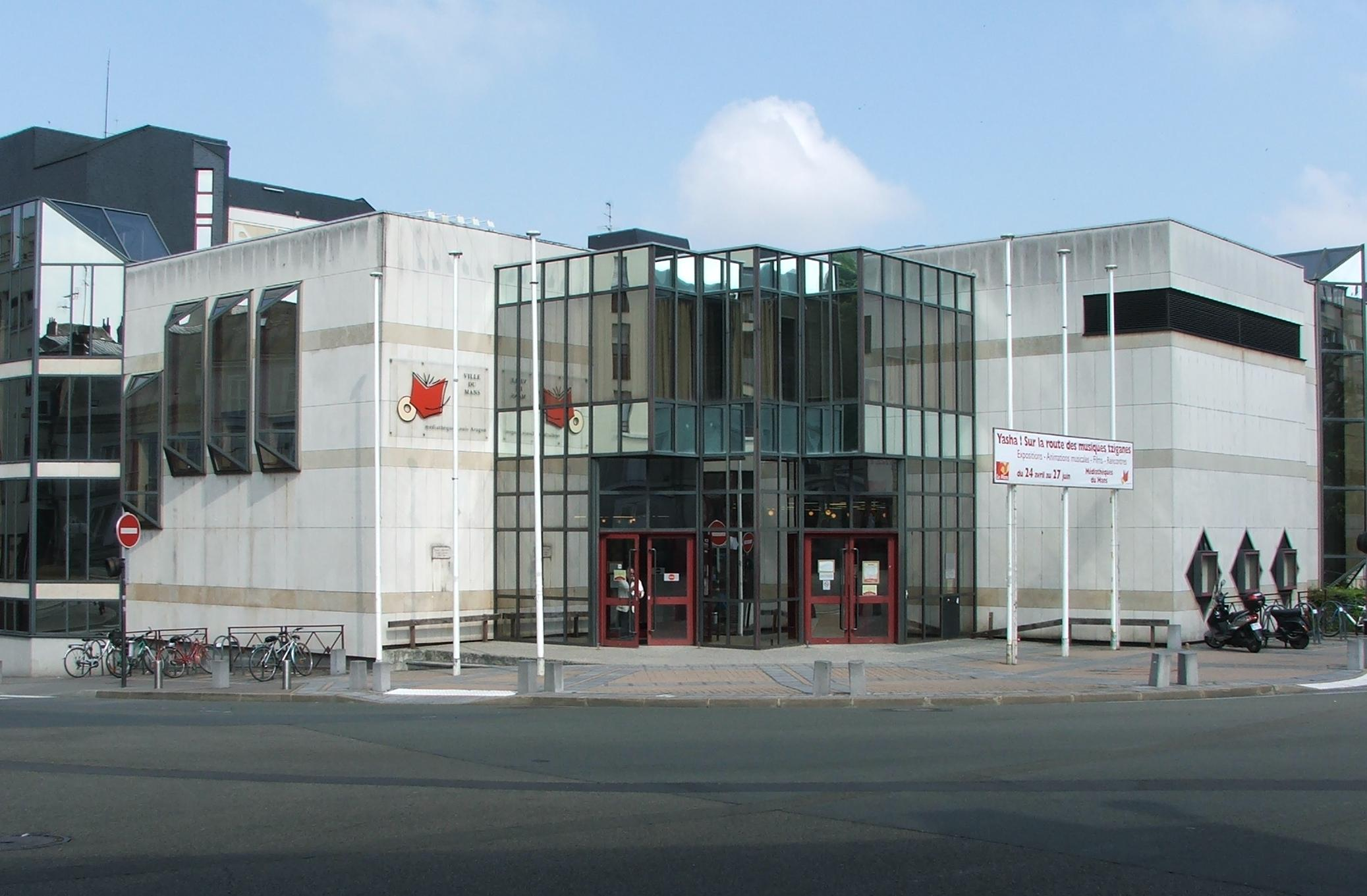 La médiathèque Louis-Aragon du Mans, créée en 1988 et remplaçant l'ancienne bibliothèque municipale de la ville.